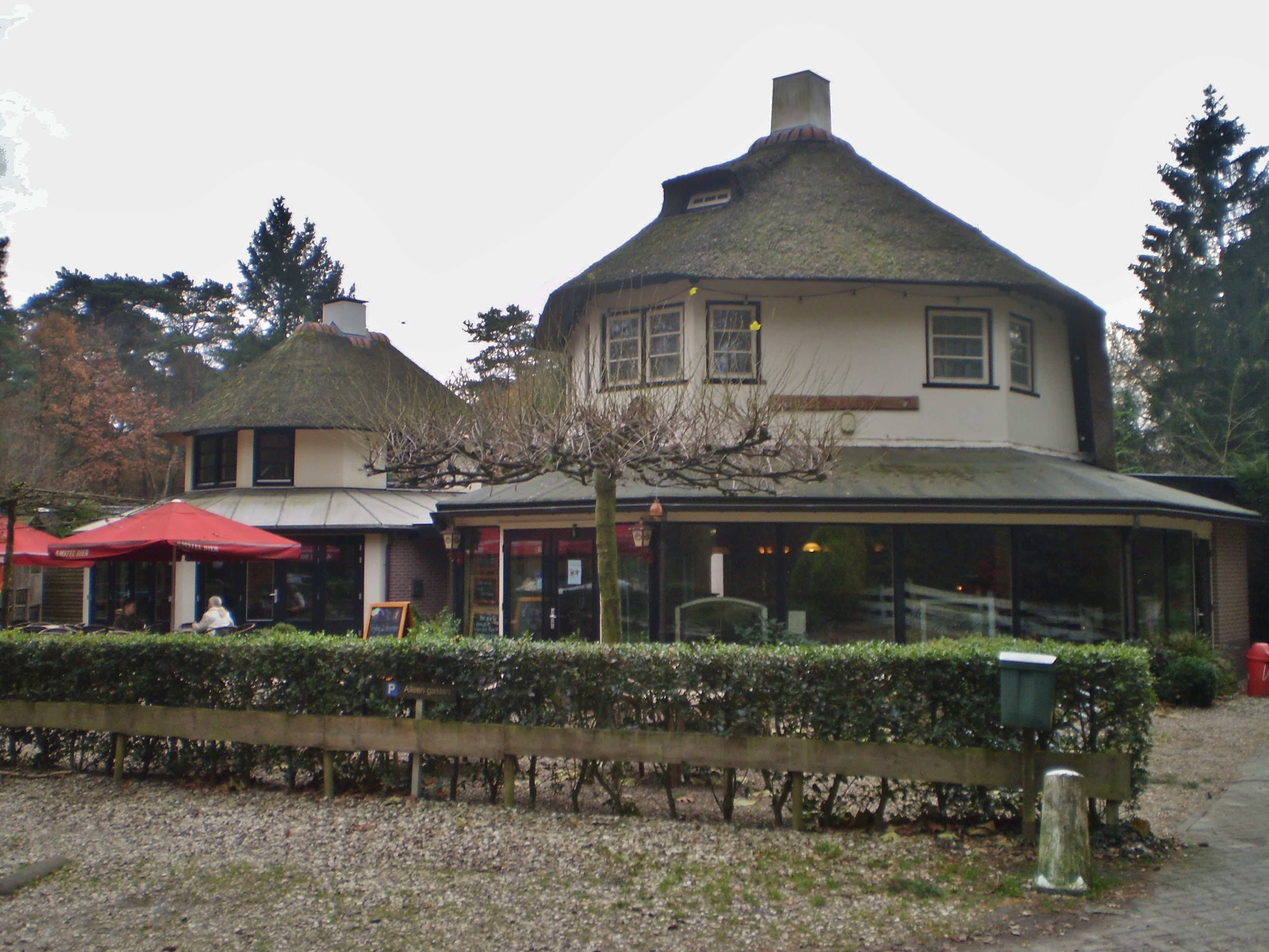 Vuursche Dreef 180